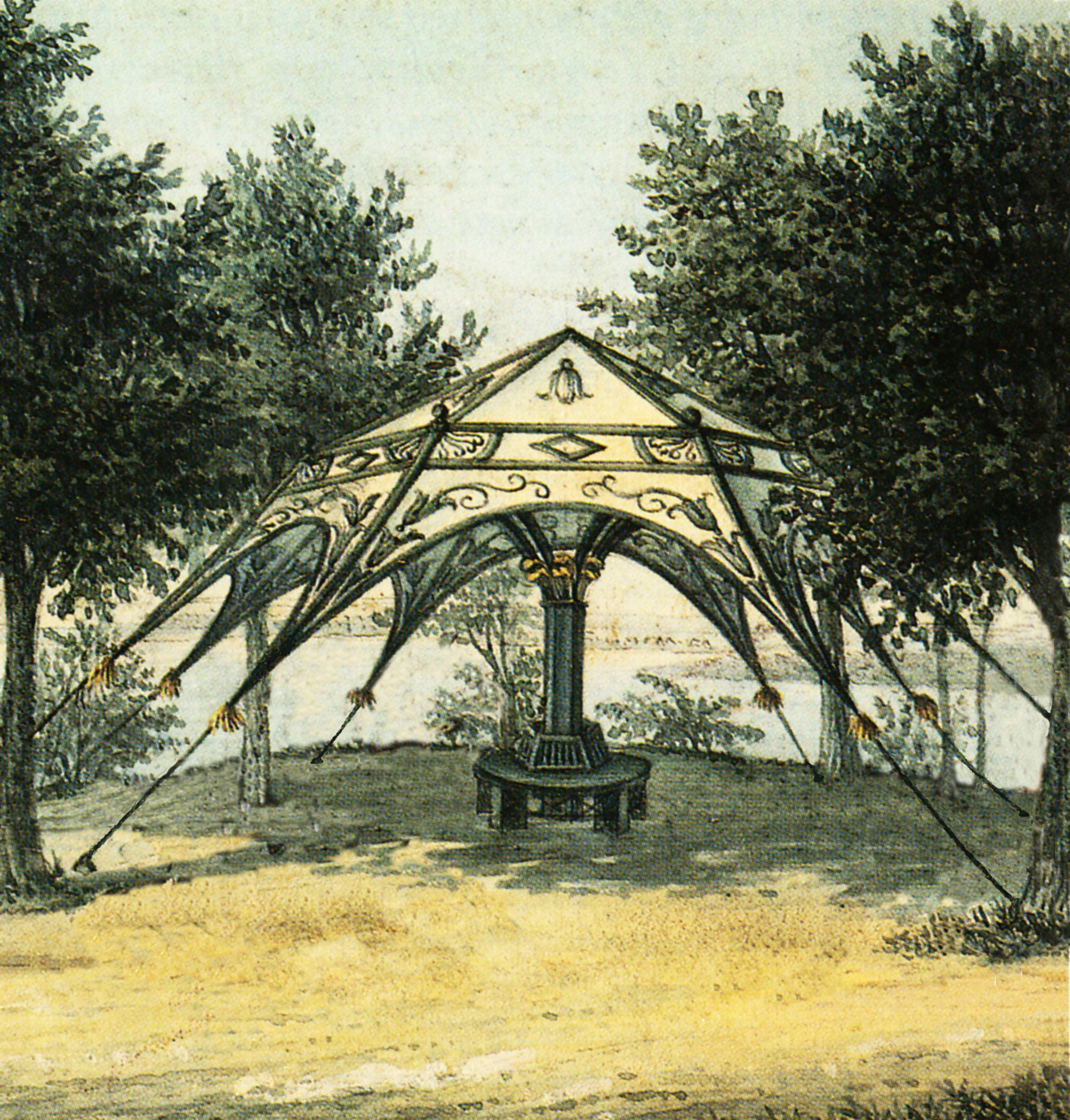 Franz Krüger, das Zelt im Glienicker Park, um 1828 (Ausschnitt)